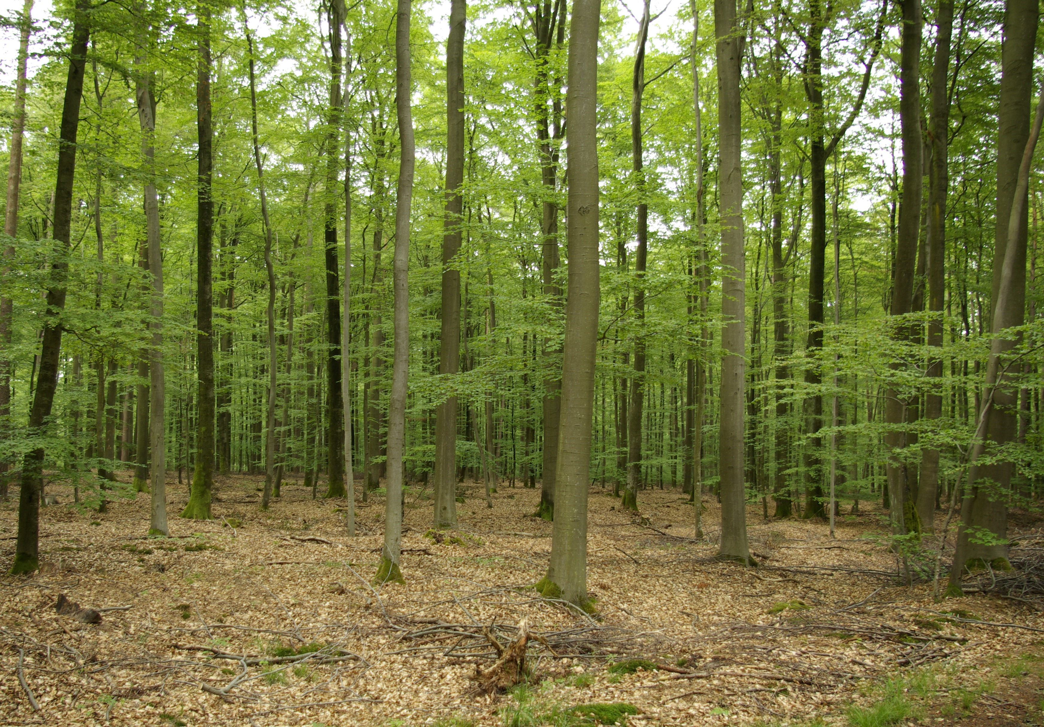 Der Bürgerwald zwischen Ebrach und der Gemeinde Rauhenebrach im Steigerwald; Gebiet im Naturpark Steigerwald.